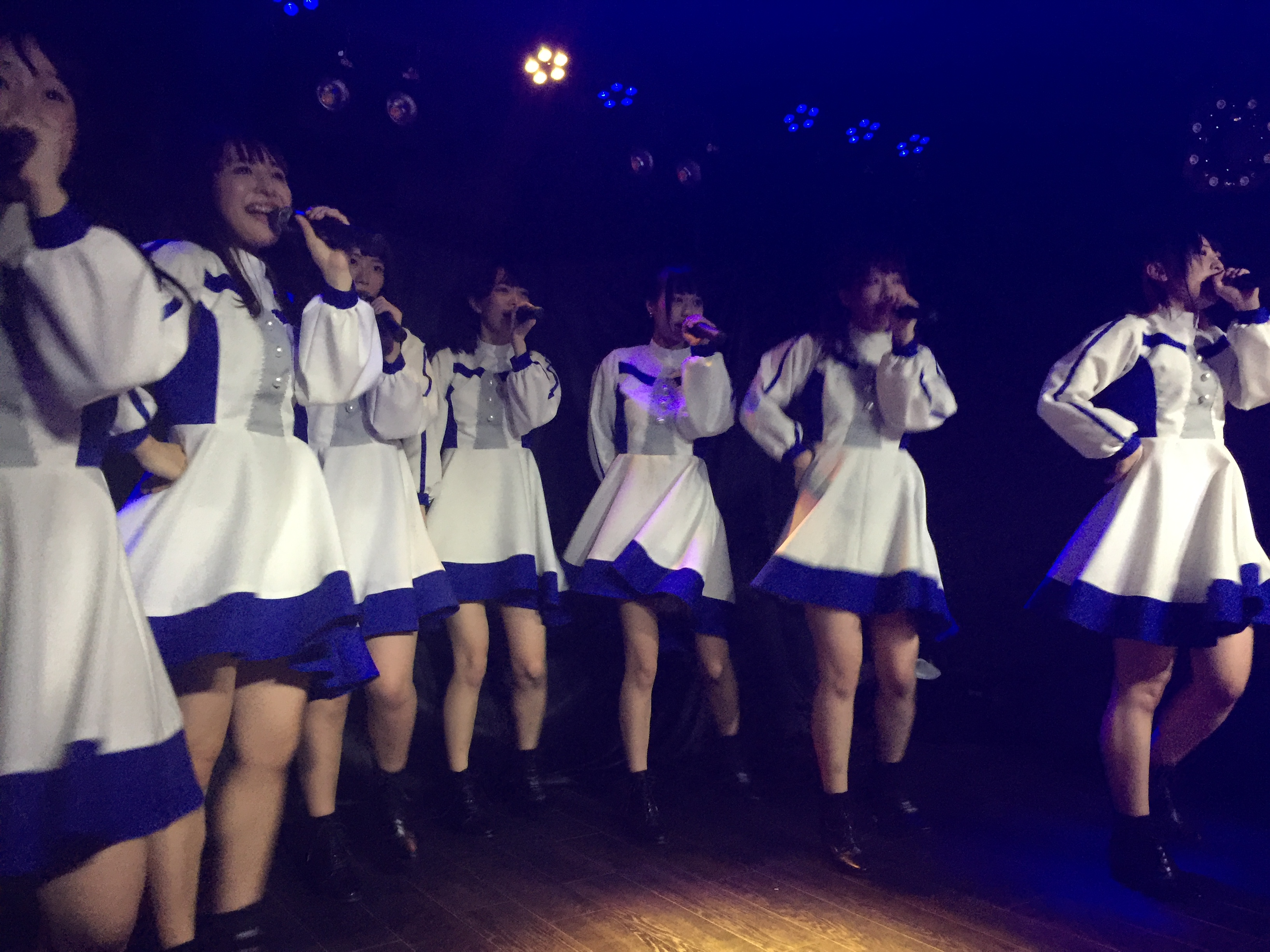 11月25日iQにてルルネージュを撮影